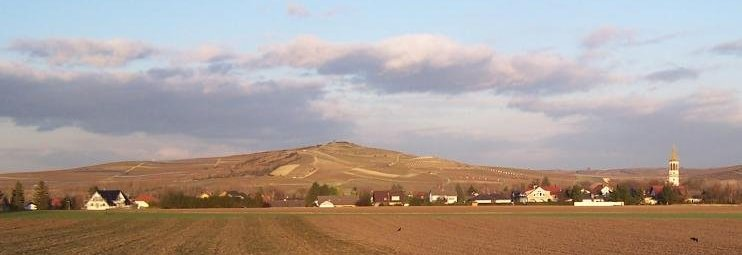 Petersberg Rheinhessen von Gau-Odernheim aus gesehen